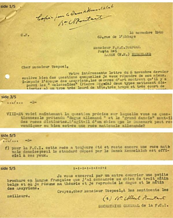 Uddrag af brev på samlet 5 sider, dateret 15-11-1948. Brevet er skrevet af generalsekretæren for FCI, Baron Albert Houtart, guvernør af provinsen Brabant, Belgien. Modtageren er den hollandske kynolog P.M.C. Toepoel. Brevet er kopieret til Dansk Kennel Klub.